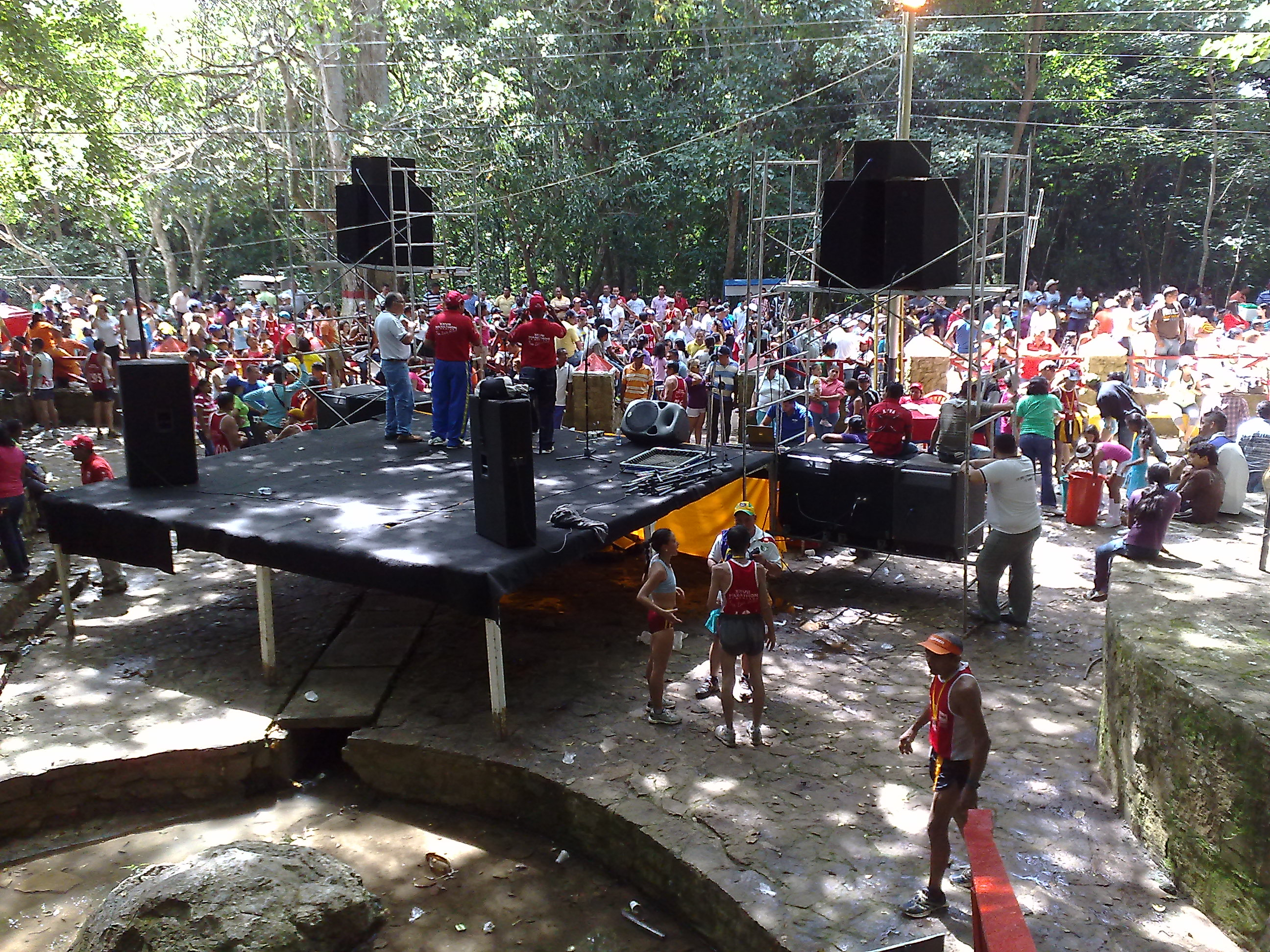 XXVII Maratón de montaña San Luis 2010, frente a la cueva de Peregüey, en San Luis.